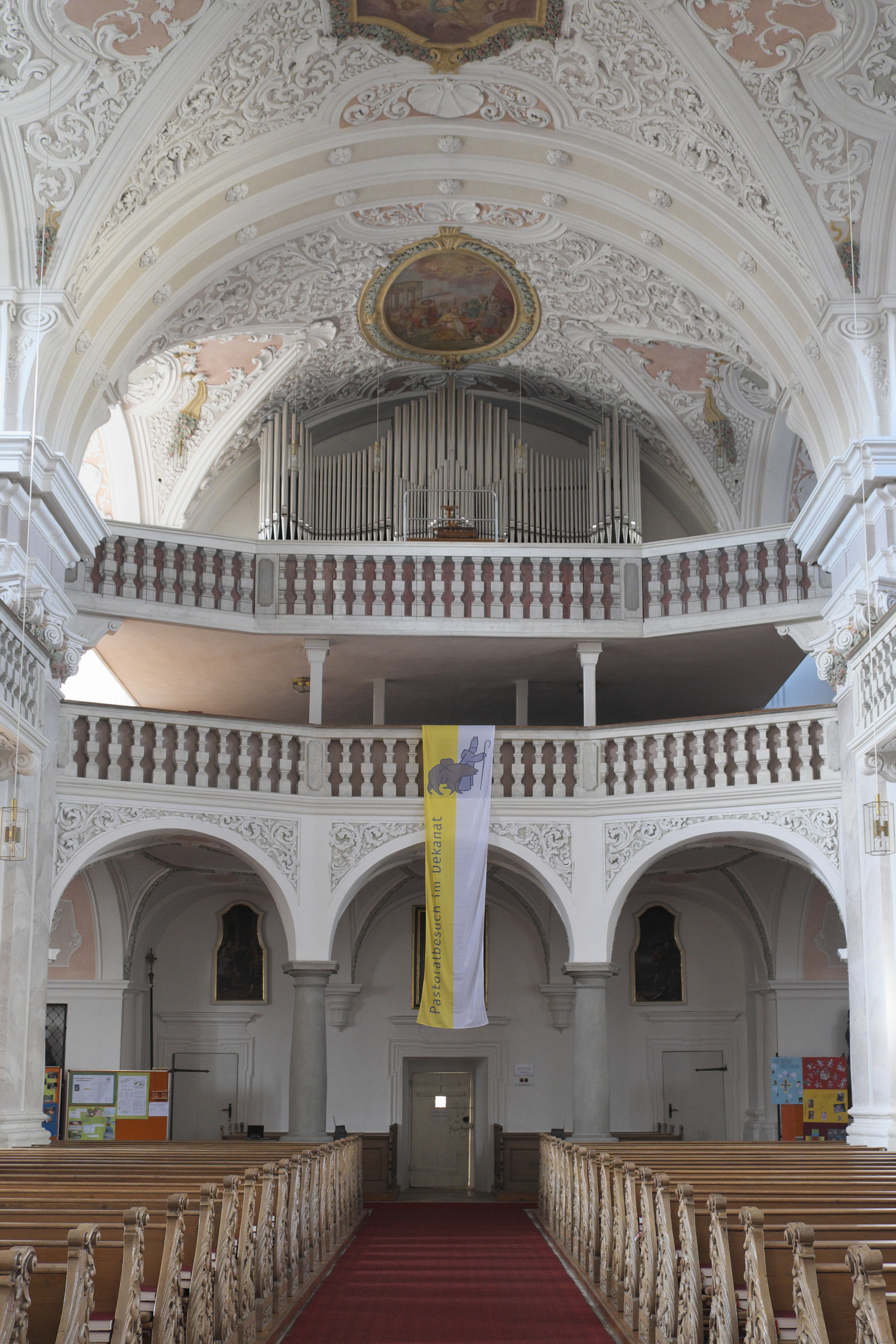 Katholische Pfarrkirche St. Martin in Waging am See im Landkreis Traunstein (Bayern/Deutschland), Orgelempore